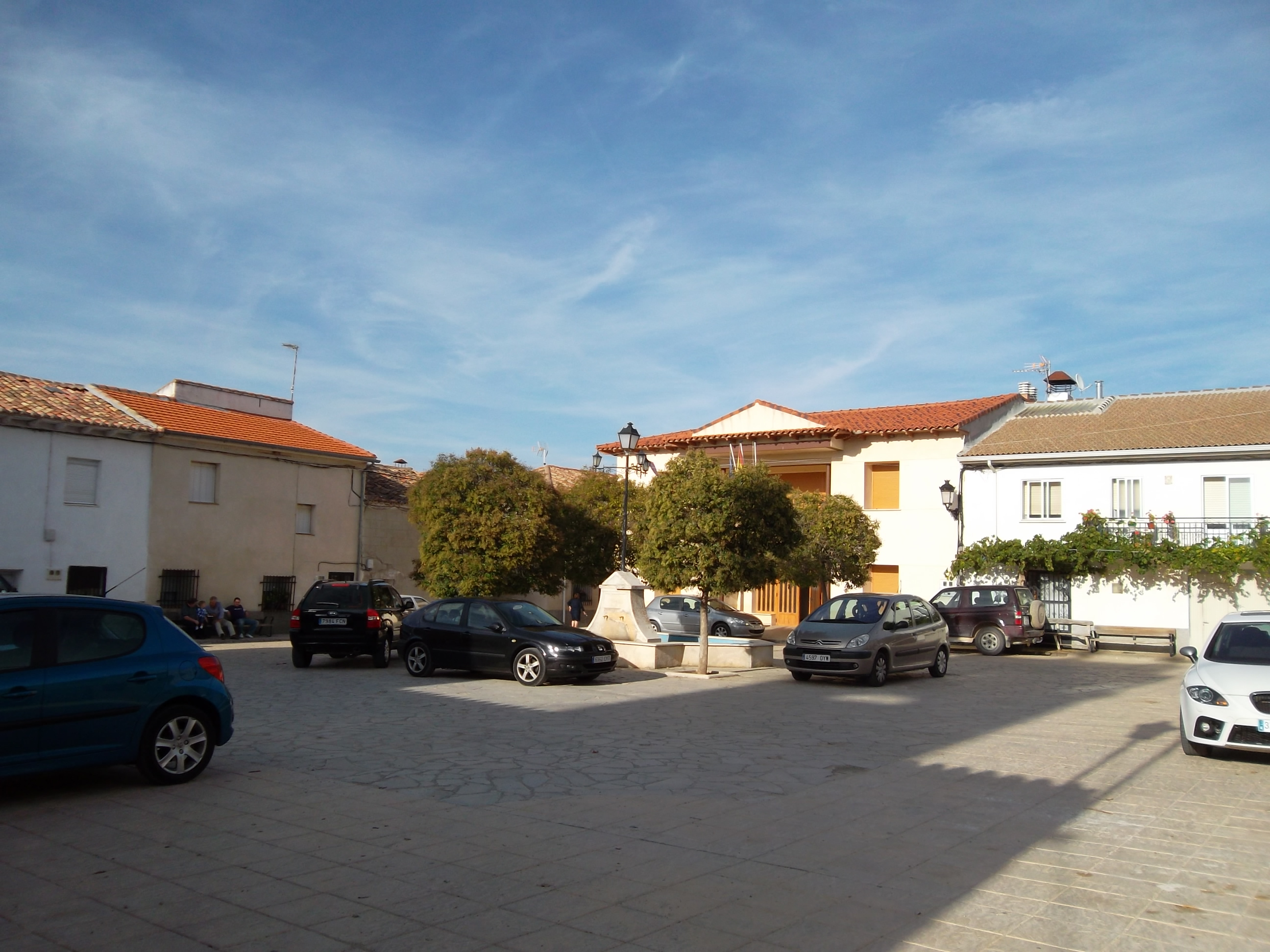 Miralrío - Vista parcial de la plaza Mayor y Ayuntamiento